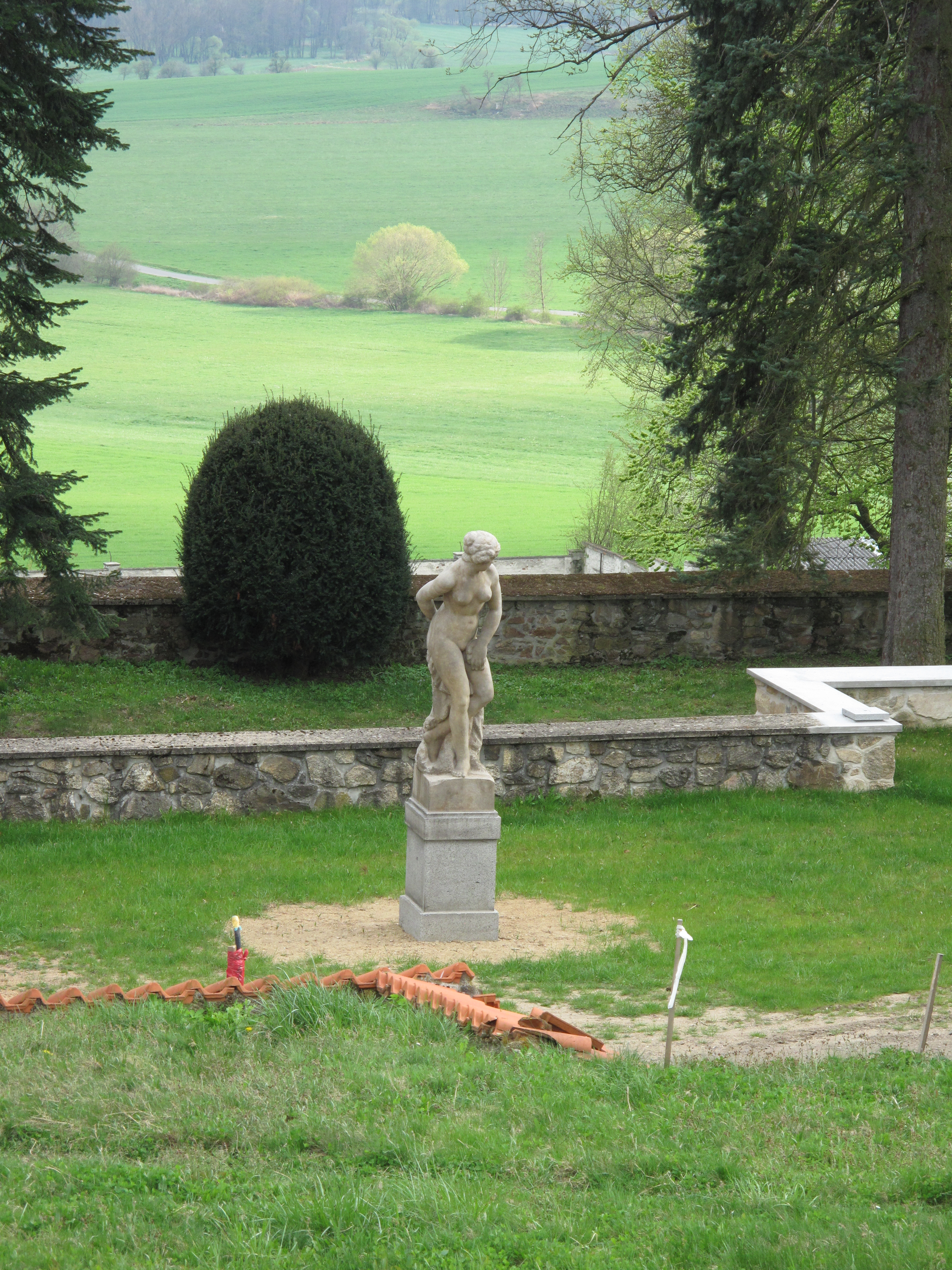 Běhařov. Okres Klatovy, Česká republika.